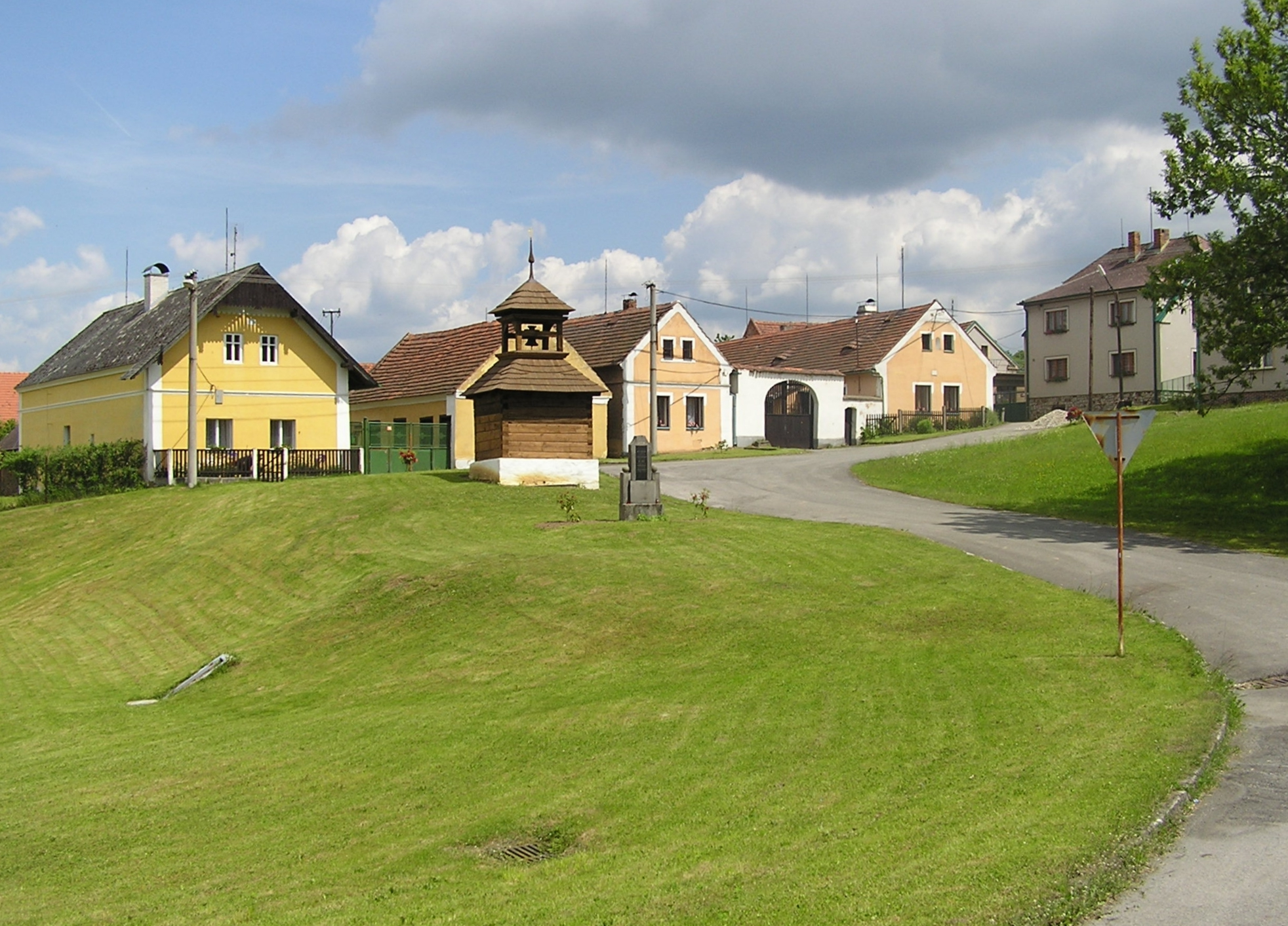 Bujesily náves